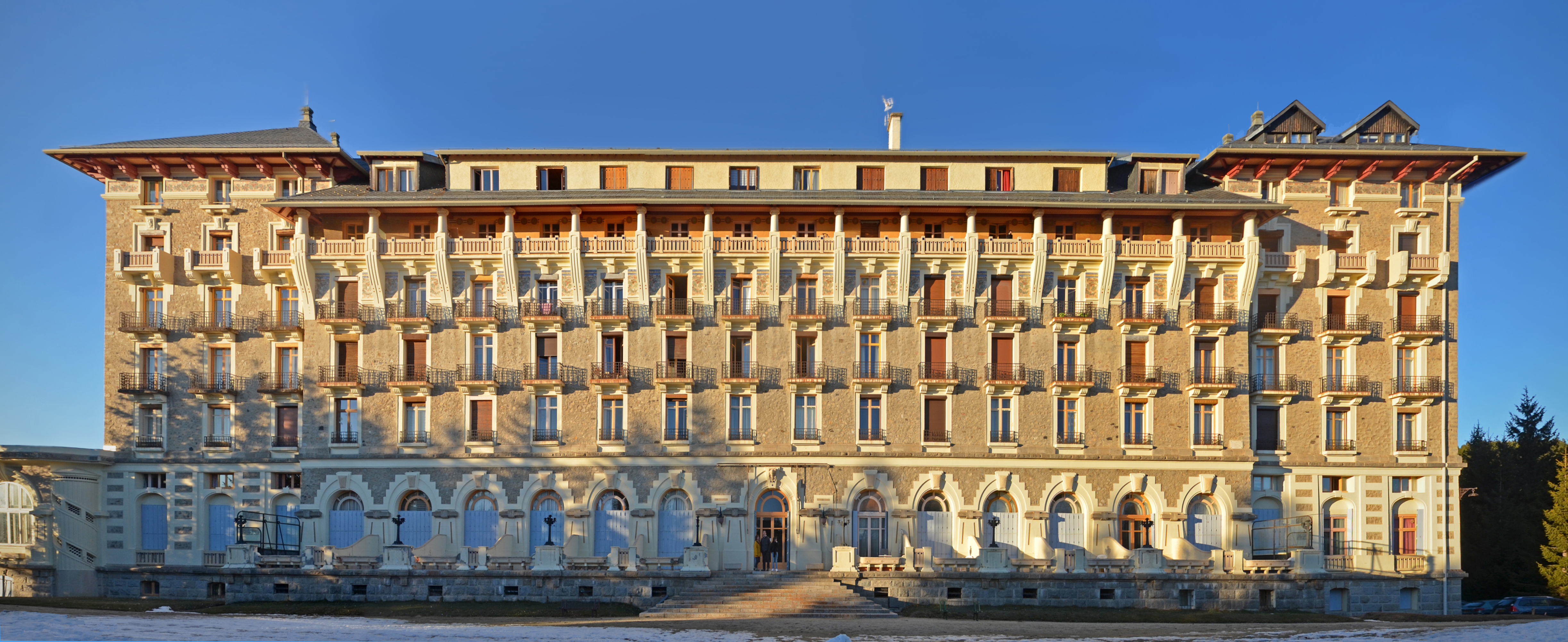 Grand-Hôtel construit entre 1910 et 1914 - Font-Romeu-Odeillo-Via (Pyrénées-Orientales) .